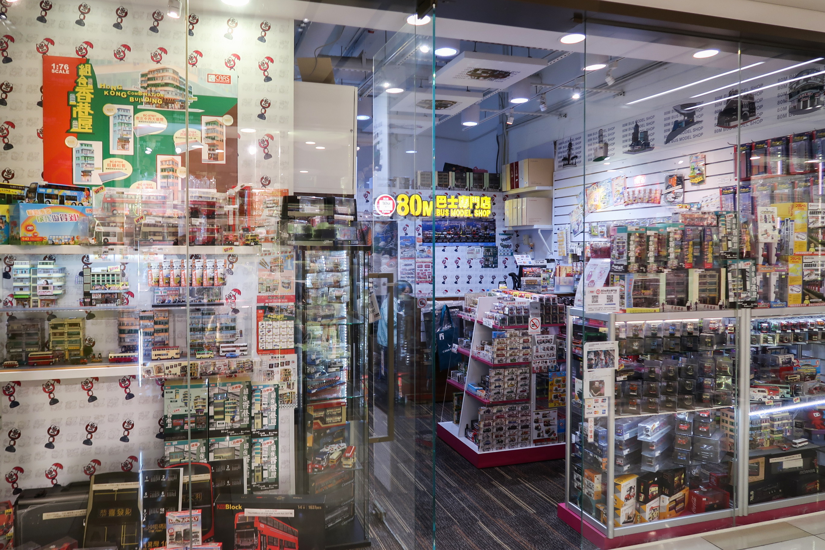 80M Bus Model Shop in KOLOUR Tsuen Wan